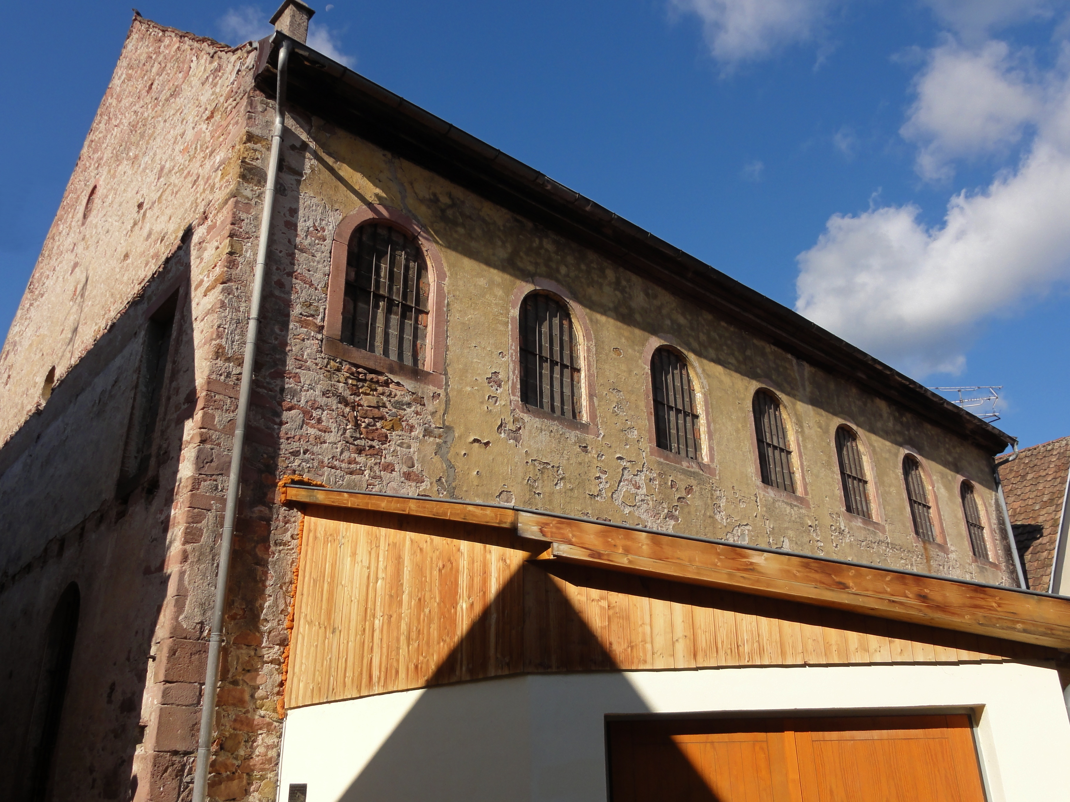 Alsace, Haut-Rhin, Ribeauvillé, Ancienne synagogue, actuellement salle de cinéma, rue de la Synagogue.